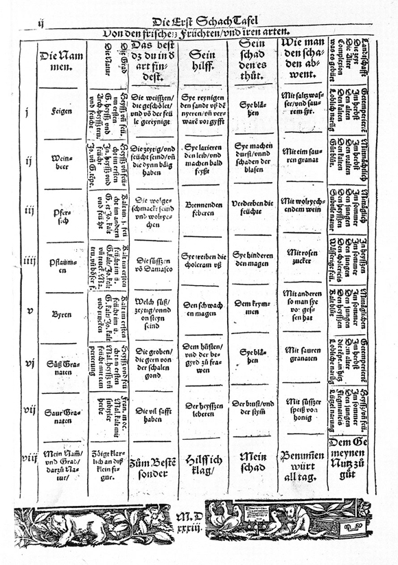 Seite aus: Schachtafeln der Gesundheit, Straßburg (H.Schott) 1533. Eine deutsche Übersetzung / Fassung von Ibn Butlans Taqwim es-sihha